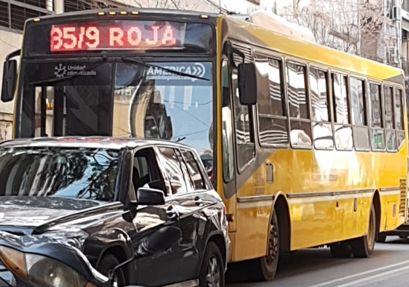 Unidad de la línea 35/9 en su variante "roja" de recorrido.